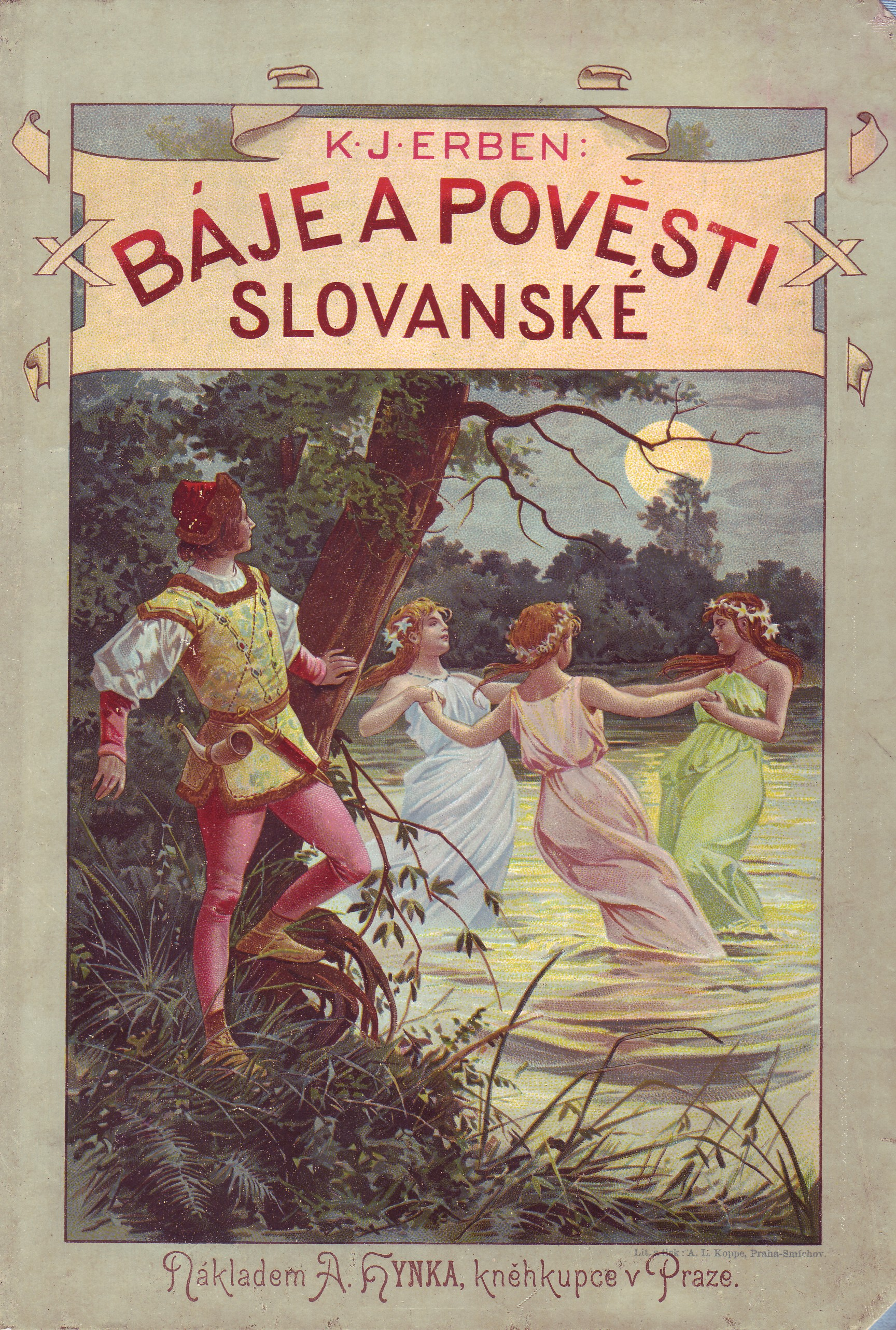 Obálka knihy K. J. Erbena (1811-1870) Báje a pověsti slovanské s použitím kresby Věnceslava Černého (1865-1936). Kniha bez vročení, ale předslov napsán v roce 1901 (jediné uvedené datum v knize). Dle katalogu nkp.cz vydáno v roce 1902.